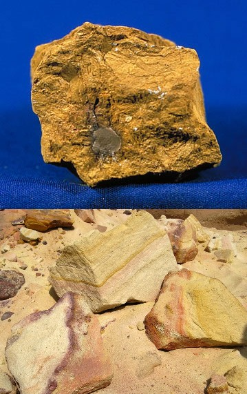 לימוניט - מינרל יוצר סלע של אבן חול